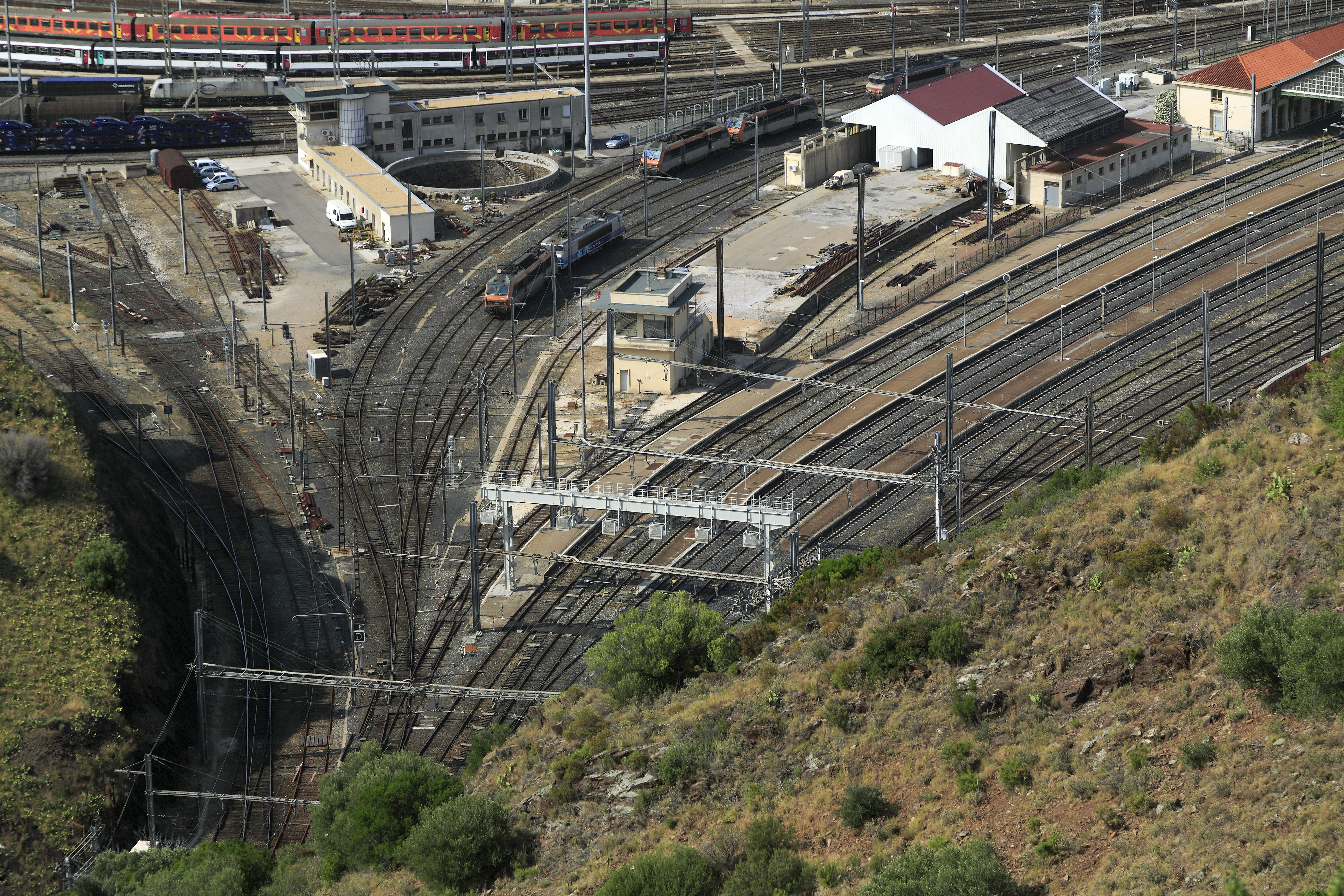 Lokwartegleise, Bahnsteiggleise bis zur Bahnsteighalle, links die Bögen zur Transfesa-Umspuranlage